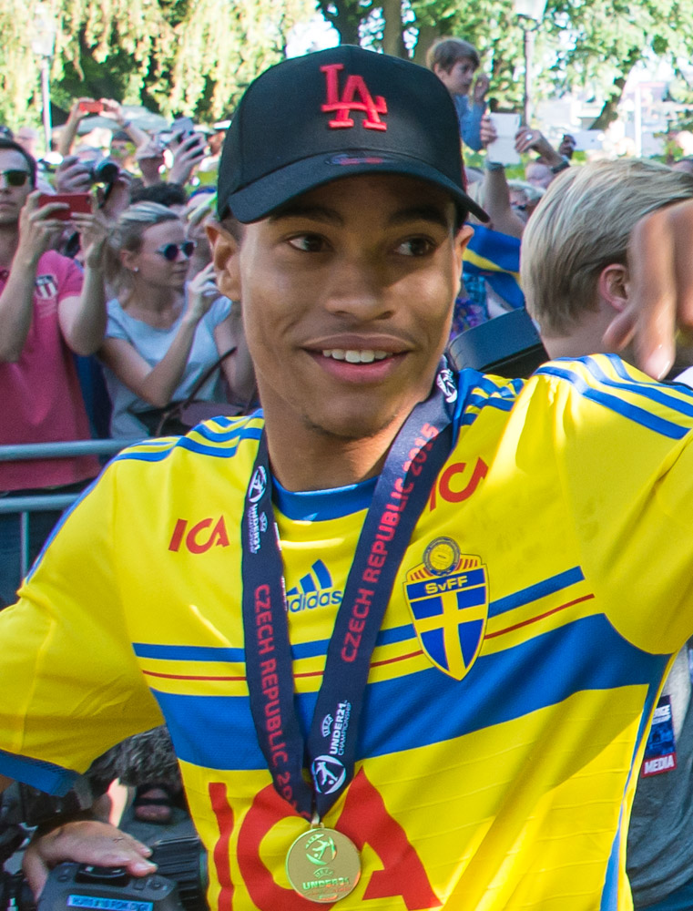 Robin Quaison och U21-mästarna firas i Kungsträdgården i Stockholm den 1 juli 2015.